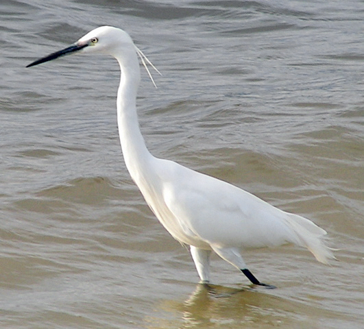 Aigrette garzette( Egretta garzetta) en début de période nuptiale portant deux fines plumes (ou aigrettes) à la nuque